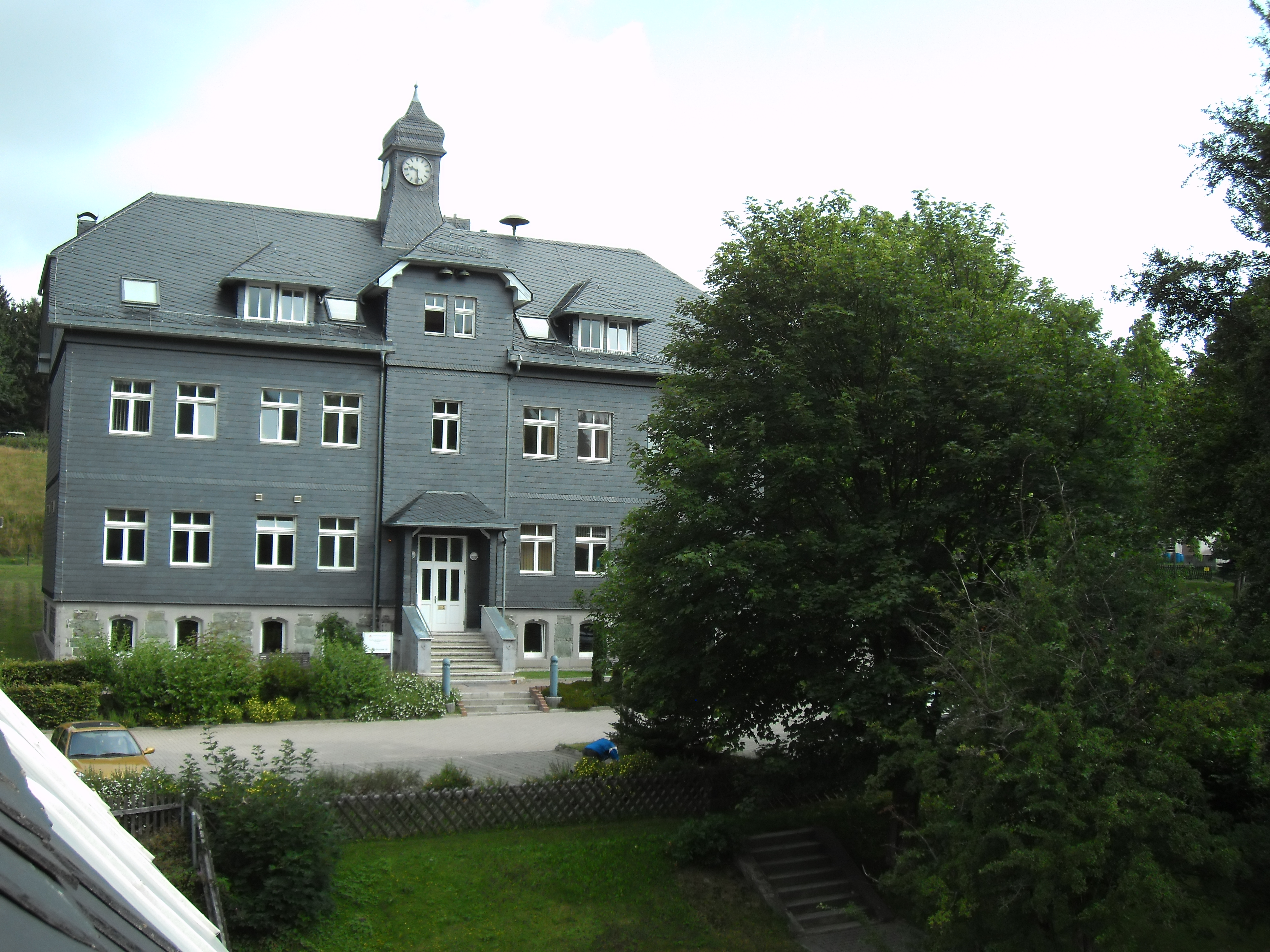 Ehemalige Schule von Ernstthal am Rennsteig, heute Kontext Ilmenau